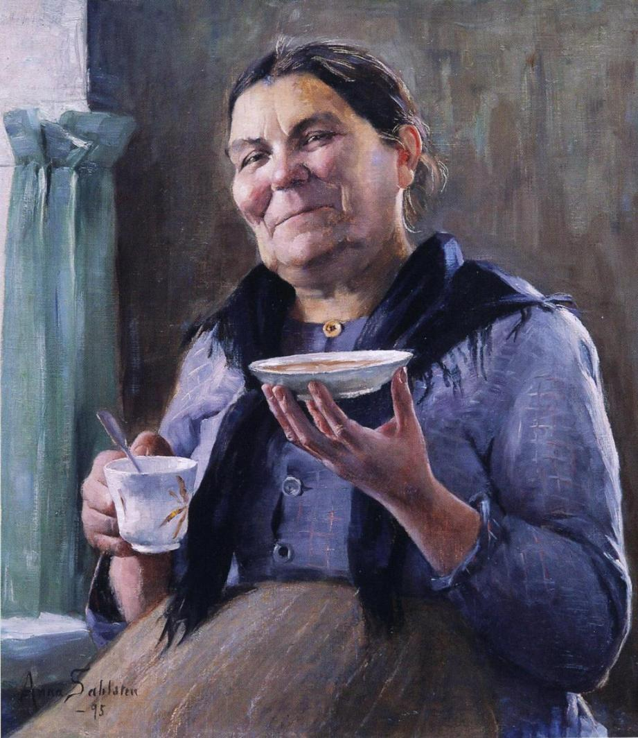 Anna Sahlsténin maalaus, kuulu yksityiskokoelmaan.